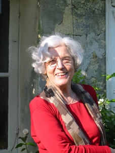 Betsy Jolas 2006 Chérence